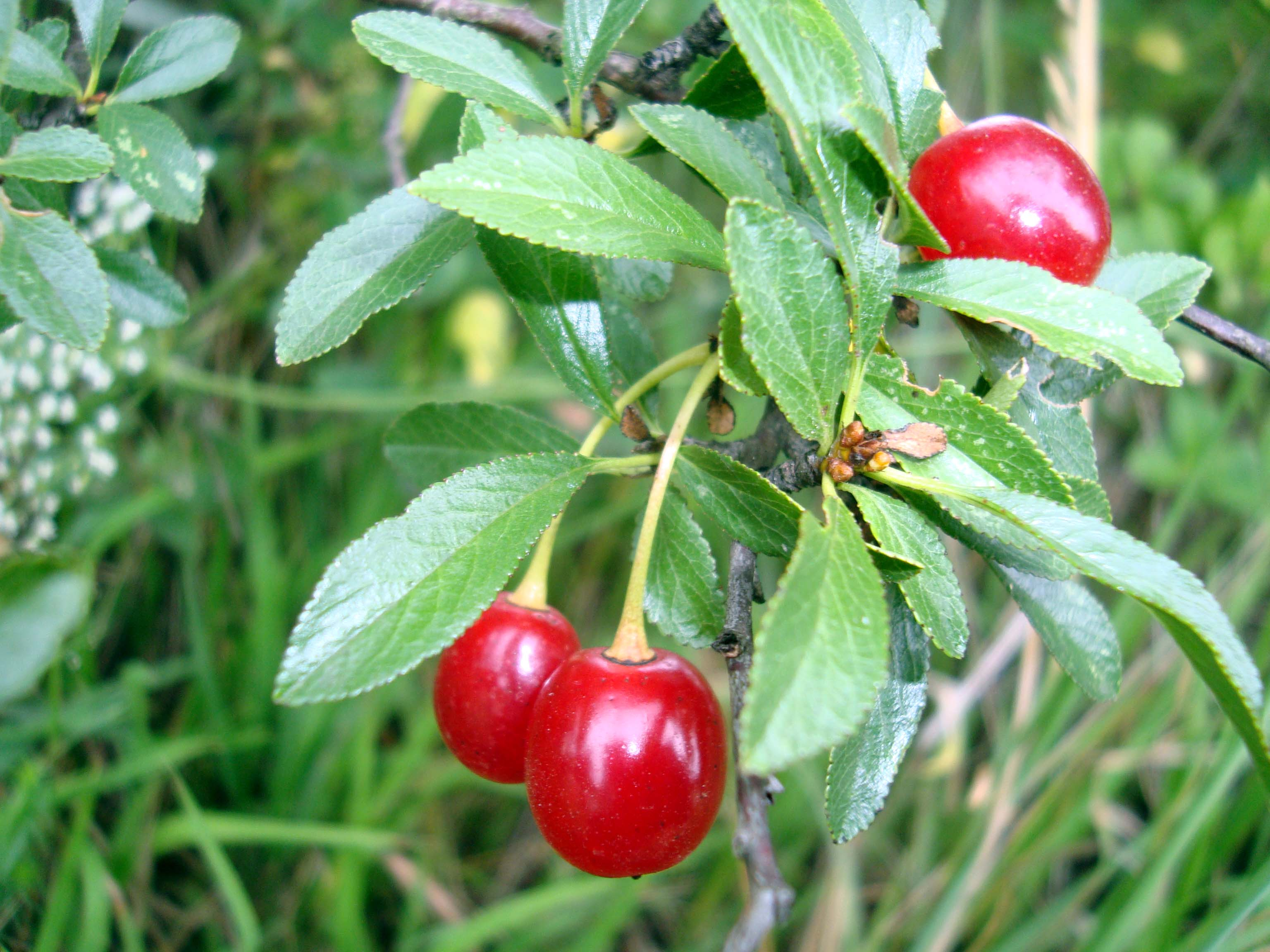 Višeň křovitá, foto Hvozdec, (cz, Brno-venkov)